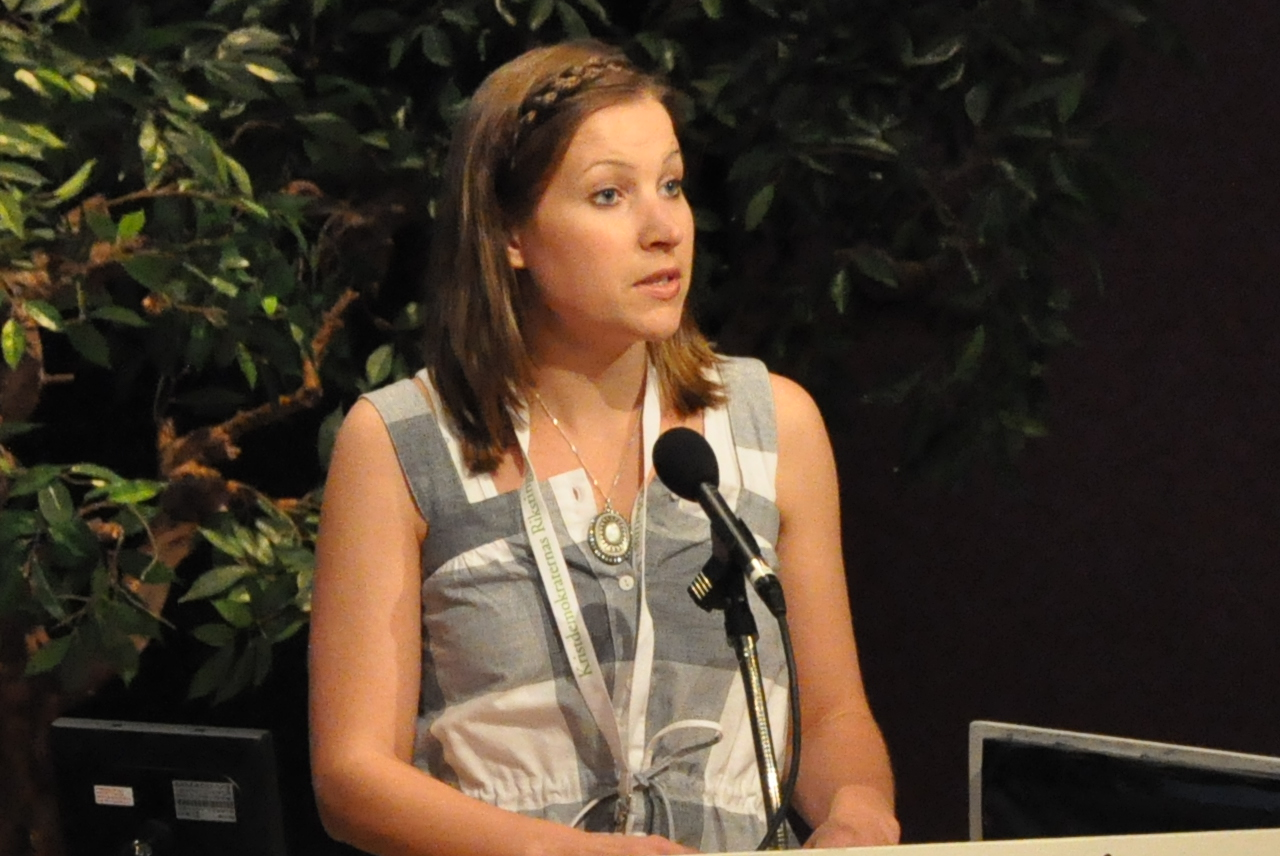 Ella Bohlin